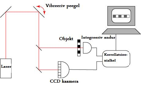 Kummituskuva_2